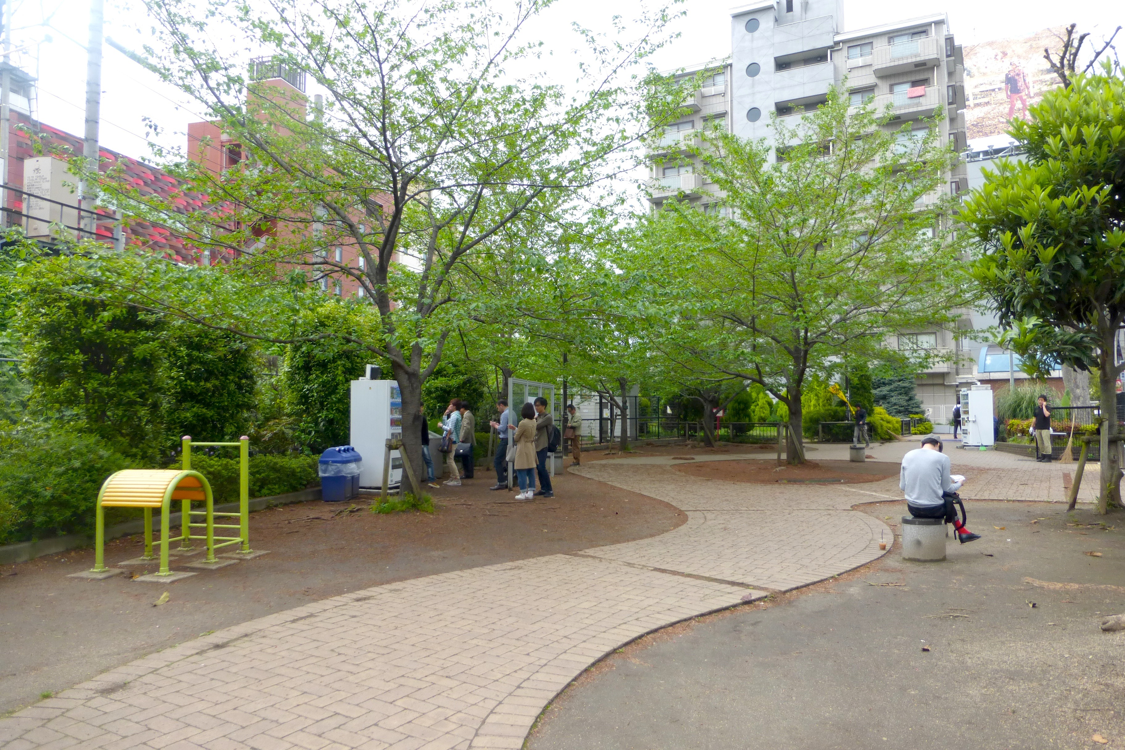 宮下公園の中 (inside Miyashita park)